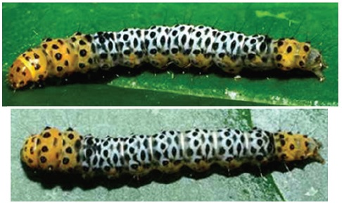 Ethmia millerorum